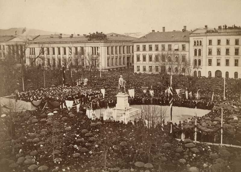 Avdukingen av Wergelandsmonumentet 17. mai 1881, park, avduking av portrettstatue, publikum, Universitetet, bygårder.